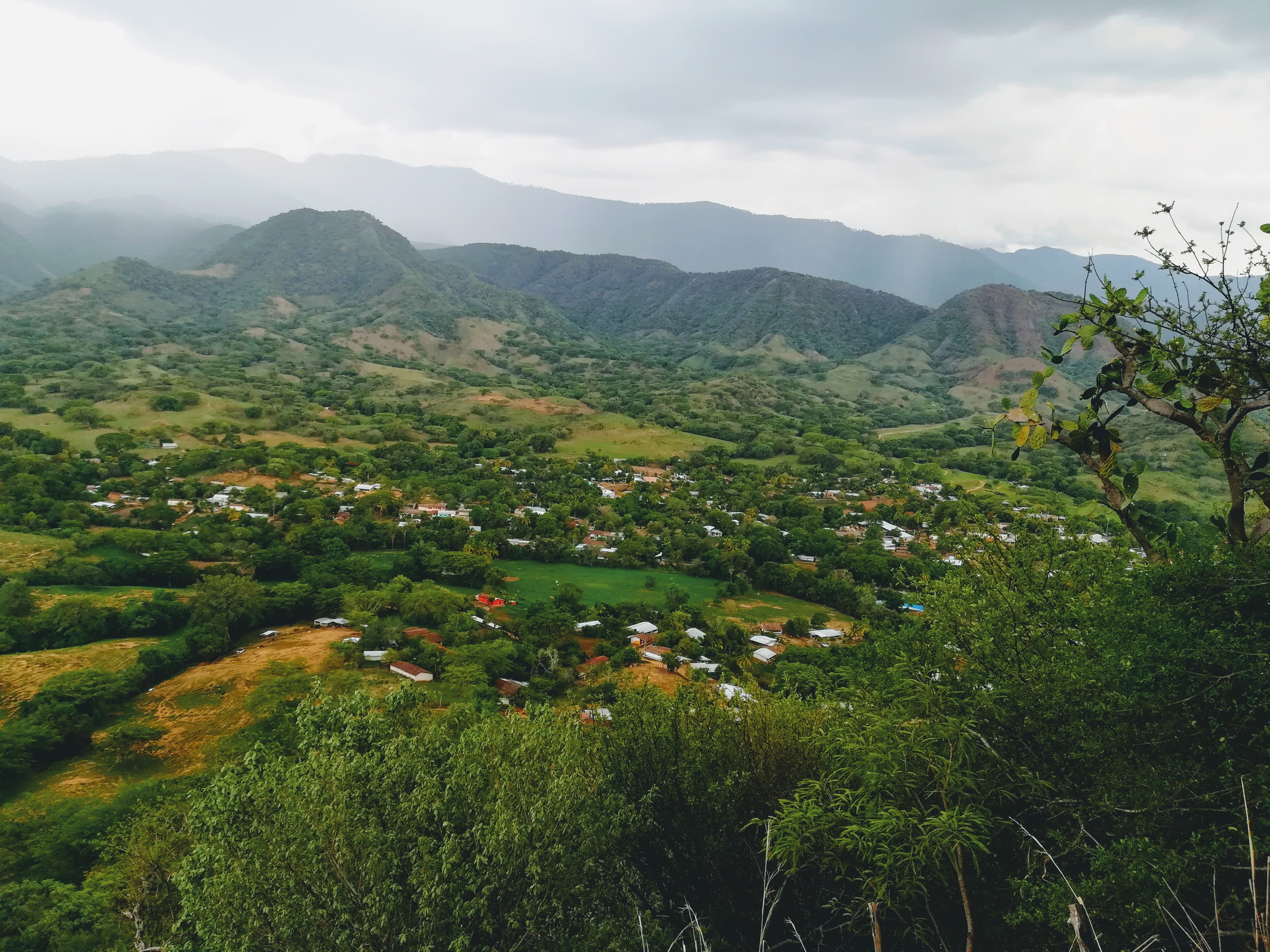 En esta fotografía se observa una parte de lo que es la localidad de Guayameo, Zirándaro, Guerrero, México.